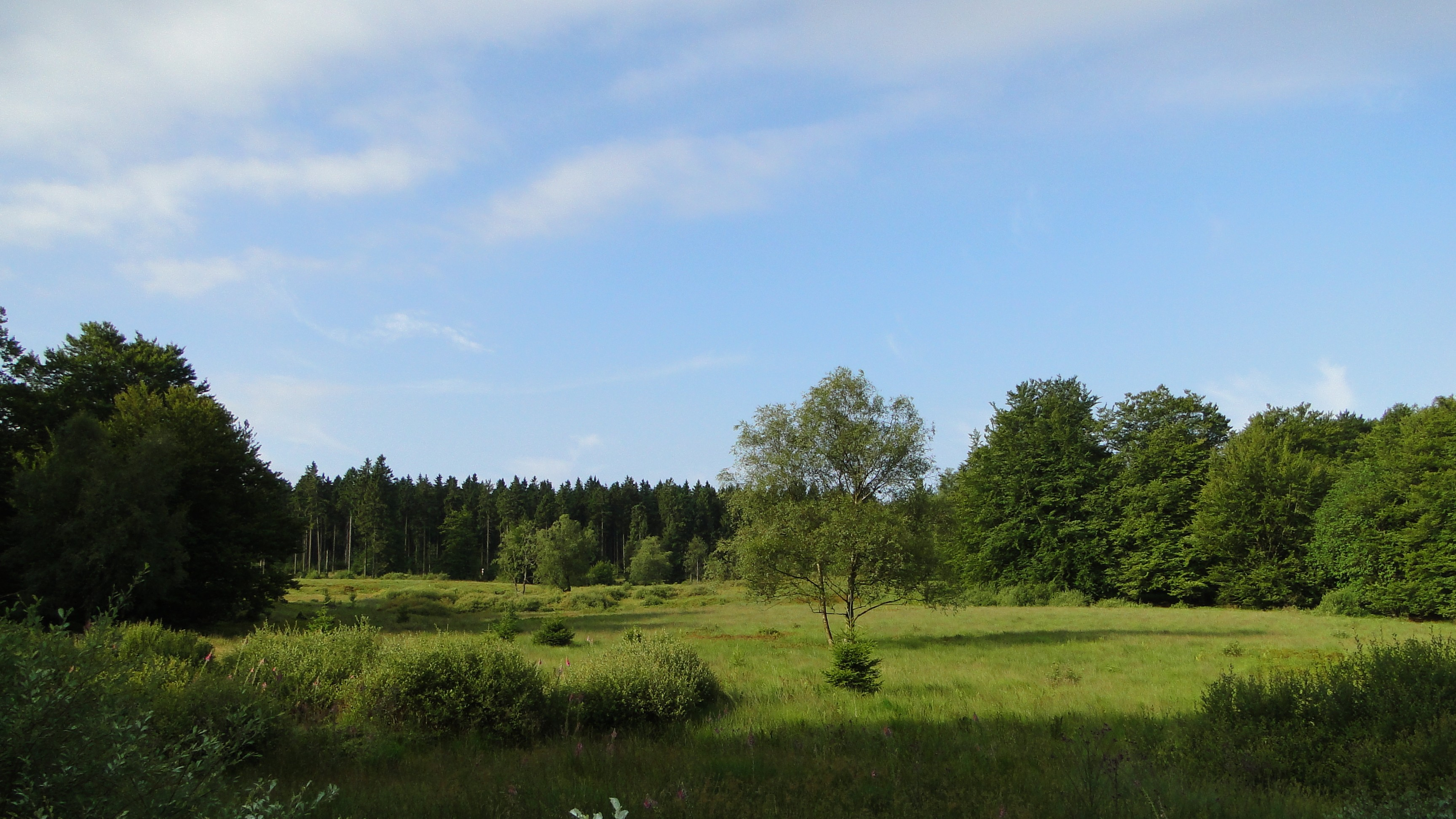 Moorbereich „Rauhes Bruch“ (ein ehemals separates, 1953 ausgewiesenes Naturschutzgebiet), Teil des Naturschutzgebiets „Hunau–Langer Rücken–Heidberg“ (NSG HSK-015) an der Hunau in Schmallenberg. Das Moor ist über 8000 Jahre alt und liegt auf ca. 770 m ü. NN.